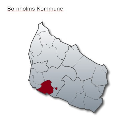 Ny Larsker Sogn